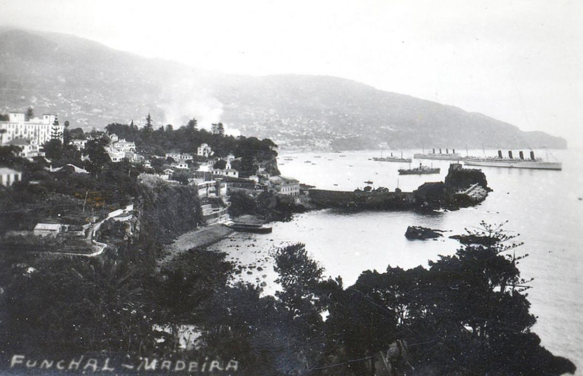 Penha de França, Cais do Pontinha e baía do Funchal. Vista do Reid's Palace Hotel, Funchal. Fotografia de 1935 (c.). Coleção particular, Funchal, ilha da Madeira.